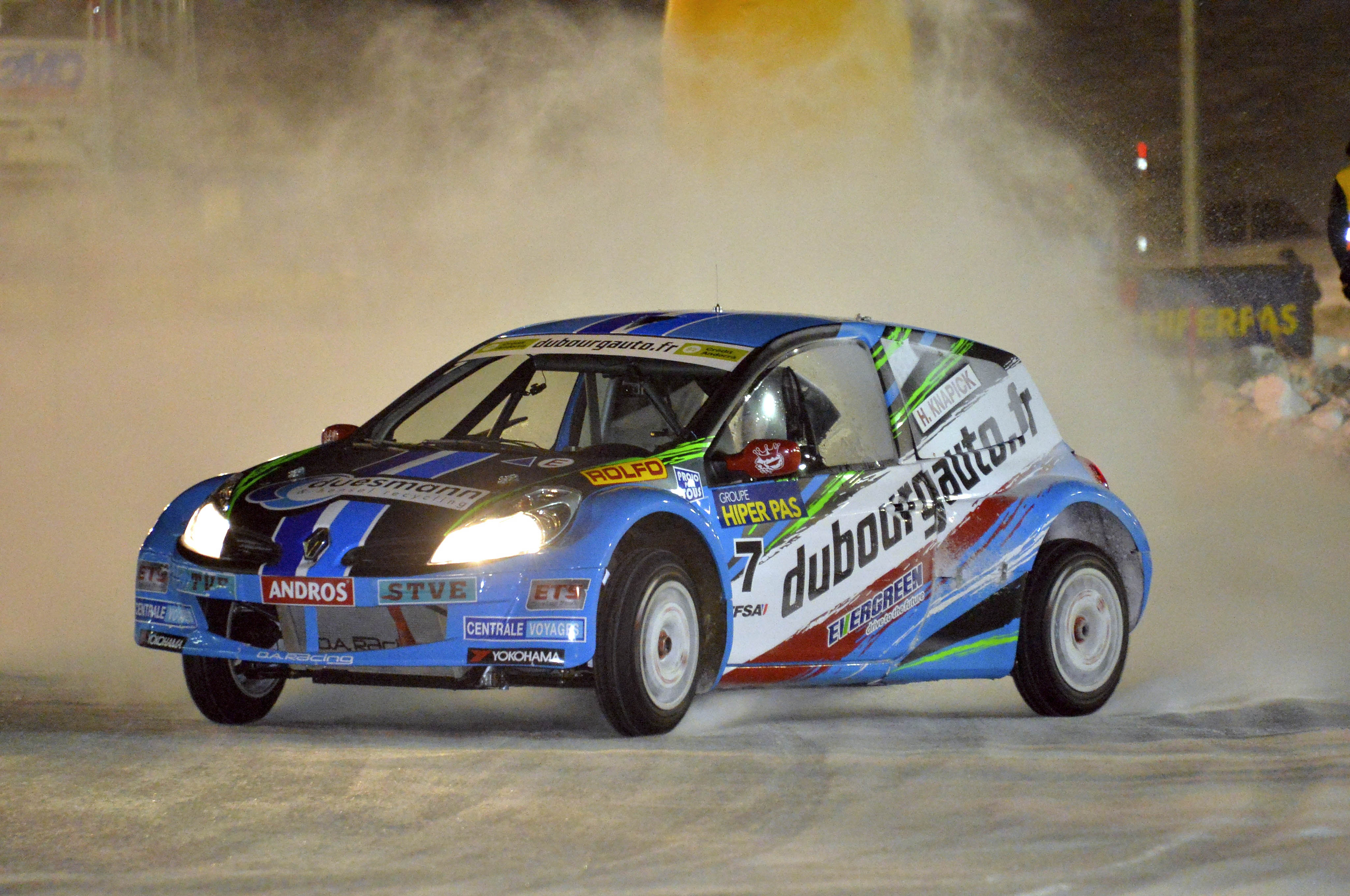 La clio 3 du DA Racing pendant la manche d'Andorre du Trophée Andros 2016